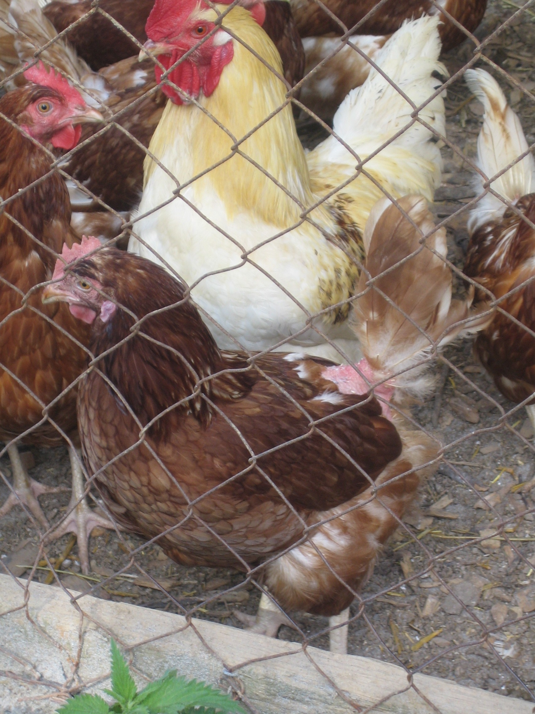 Hühner aus artgerechter Haltung